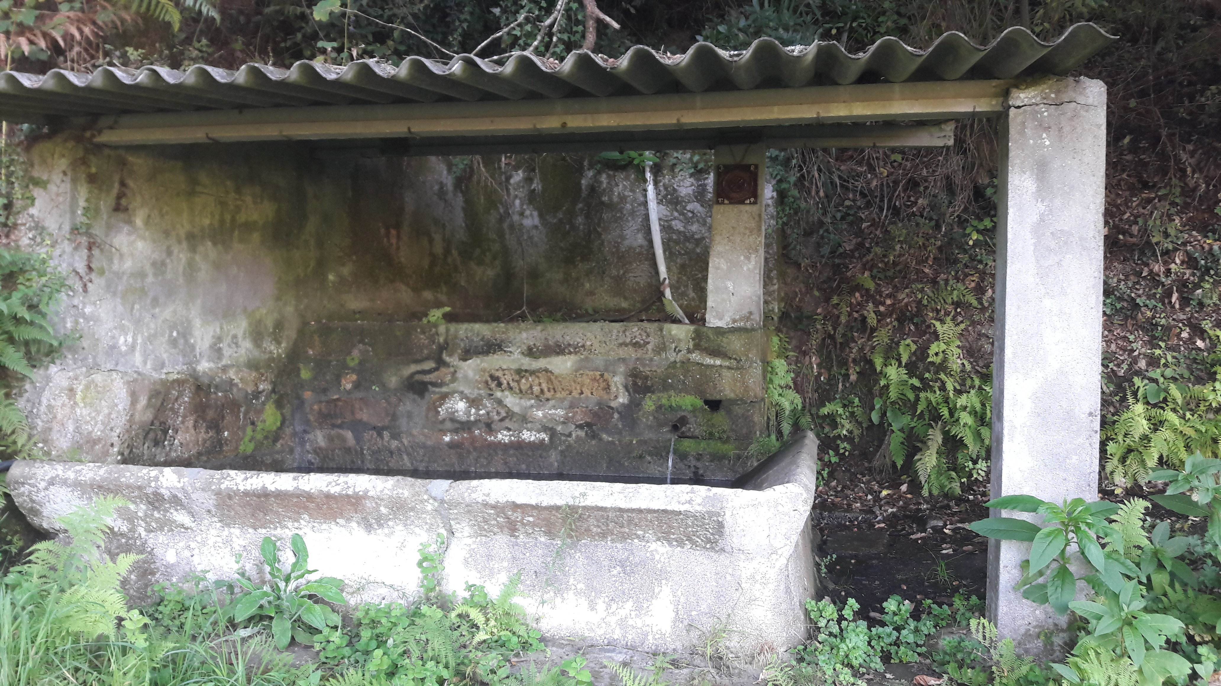 Fonte de Reibó